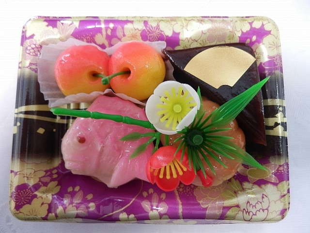 北海道札幌の口取り菓子